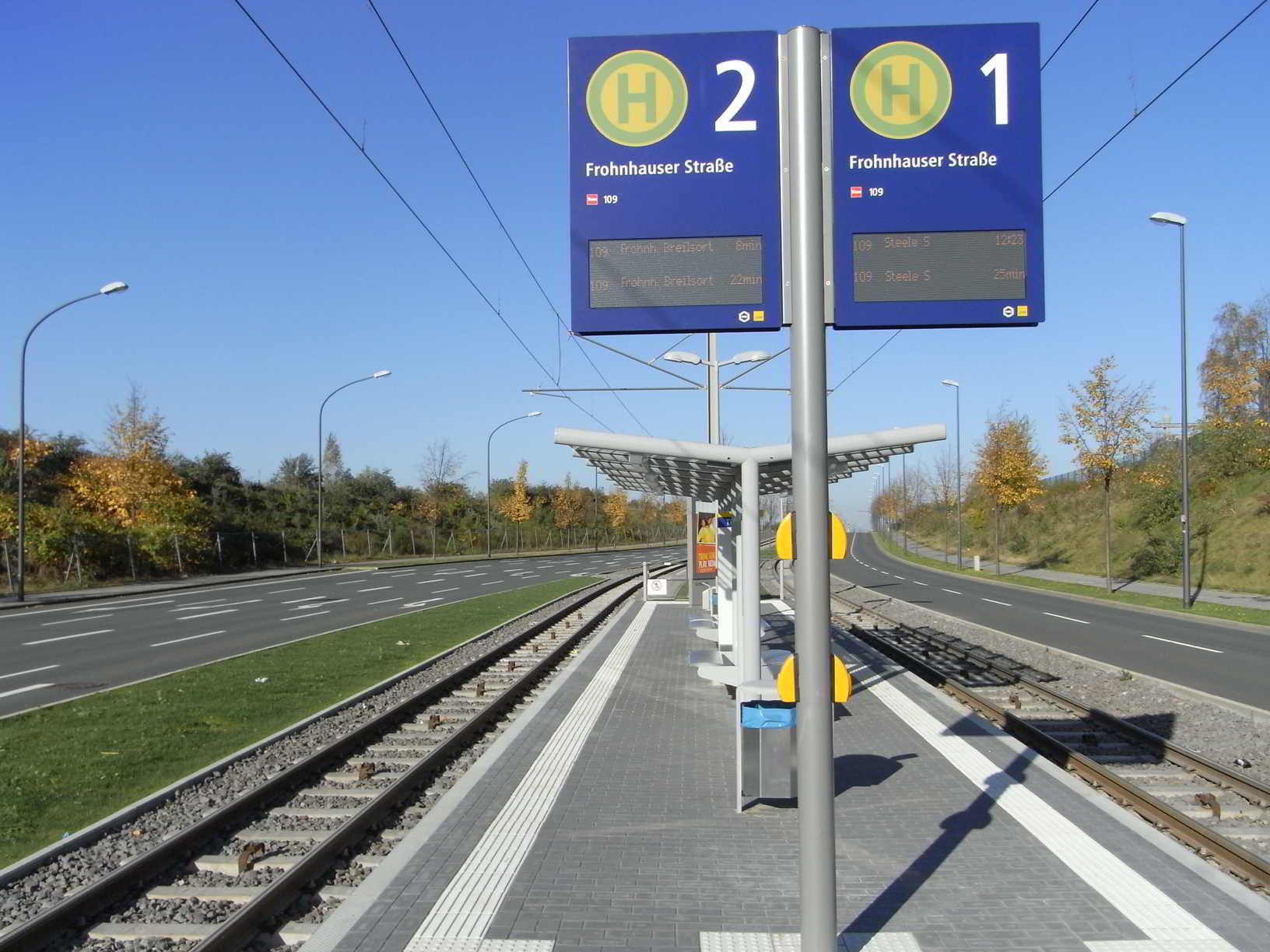 Hst. Frohnhauser Straße der Neubaustrecke in Essen (Thyssen-Krupp - Alfred-Krupp-Schule)